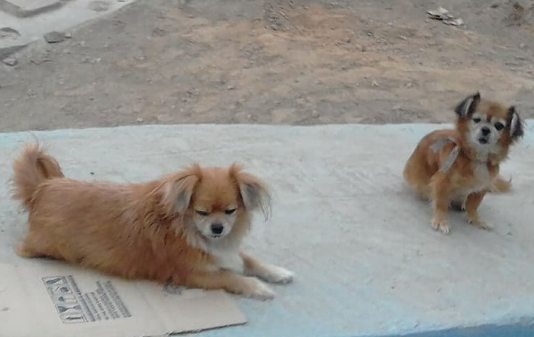 Imagen de 2 ejemplares híbridos de la raza de perro pekines (pequinés) en el cementerio de Huaycan, Ate, Lima.